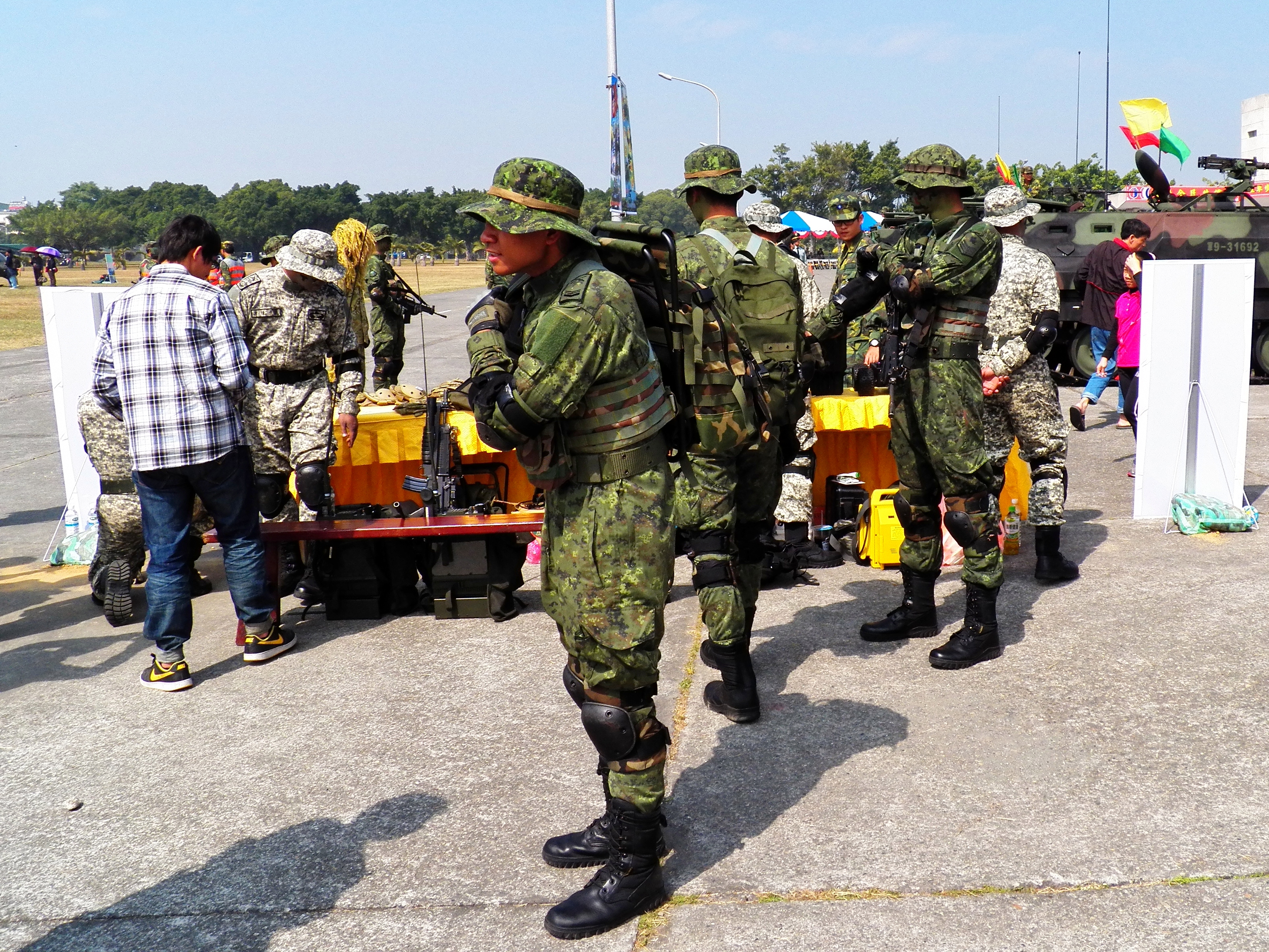 2012年陸軍步兵學校營區開放活動，來自嘉義崎頂精忠營區支援的特戰小組攤位後方成員穿戴裝備，準備示範。